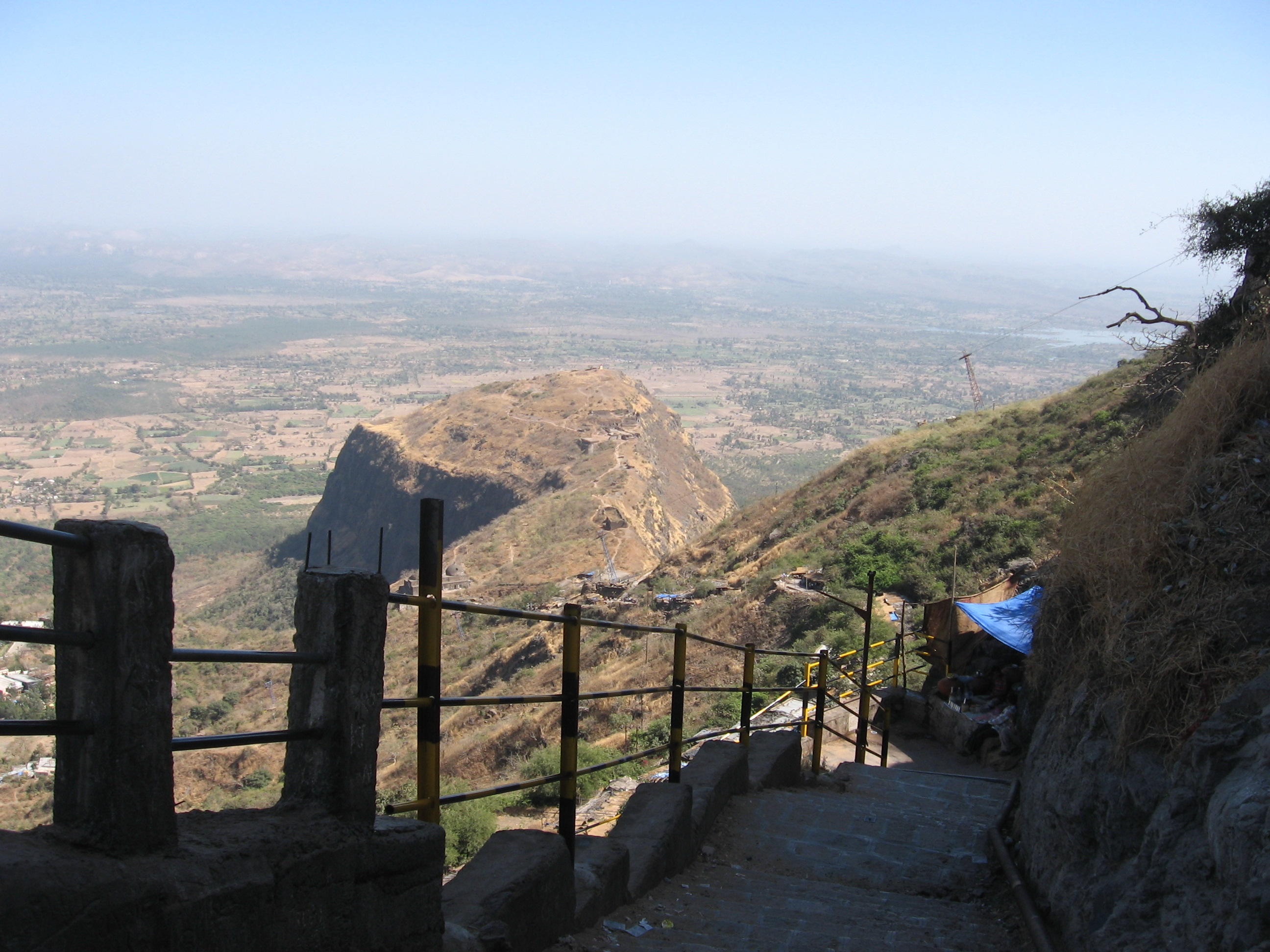 Chemin d'accès au temple et vue partielle de la colline de Pavadagh Gujarat